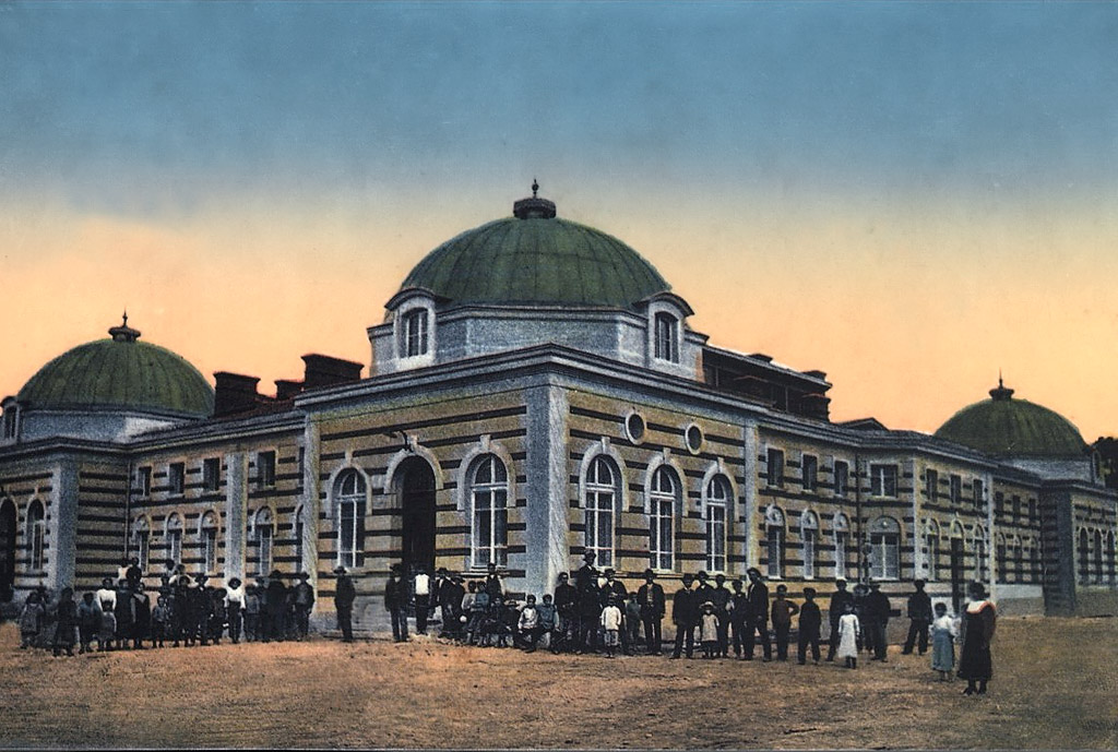 Кюстендил, Чифте баня, 1913 г.